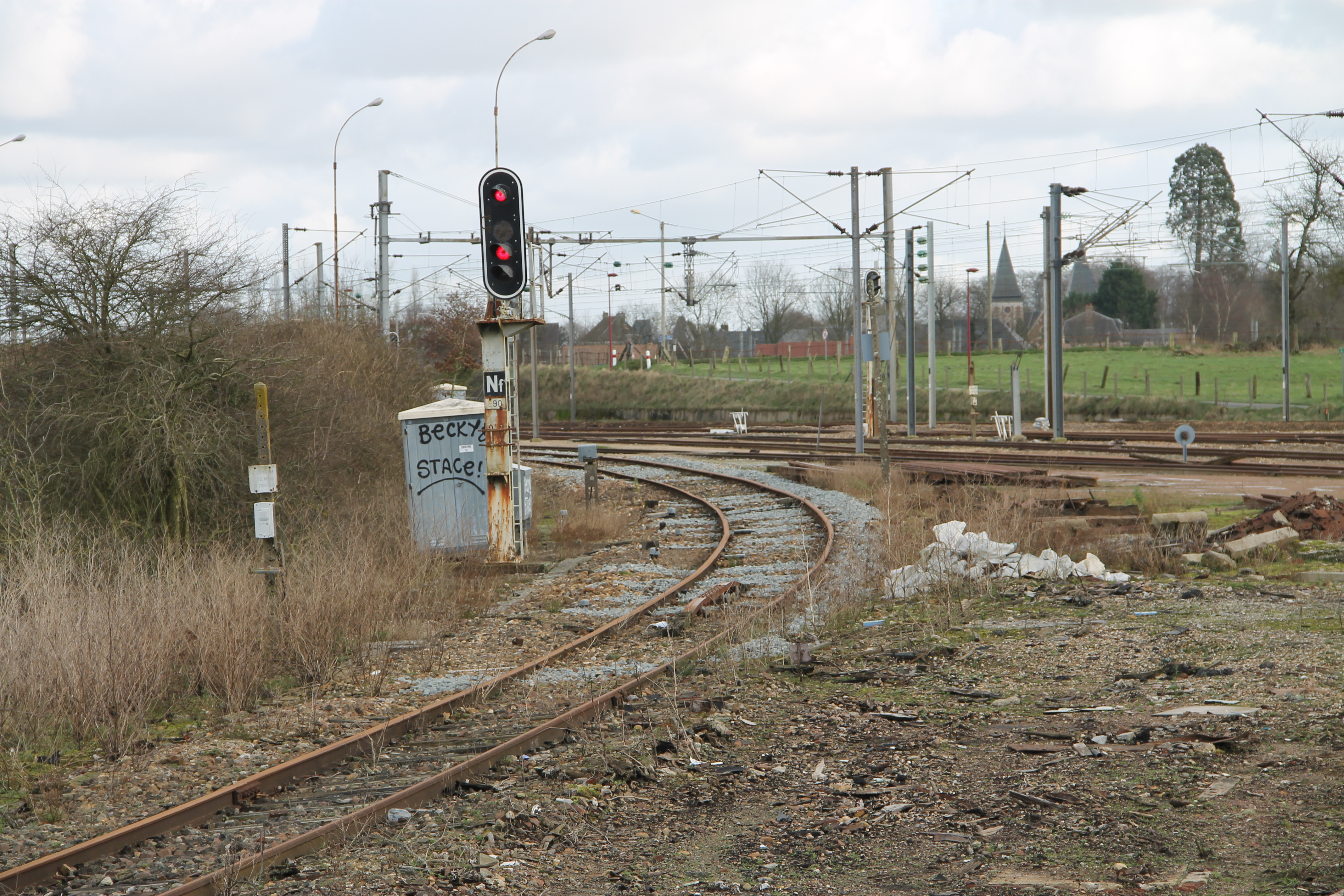 Arrivée de la ligne en provenance de Saint-Valery-en-Caux en gare de Motteville, Seine-Maritime, France.